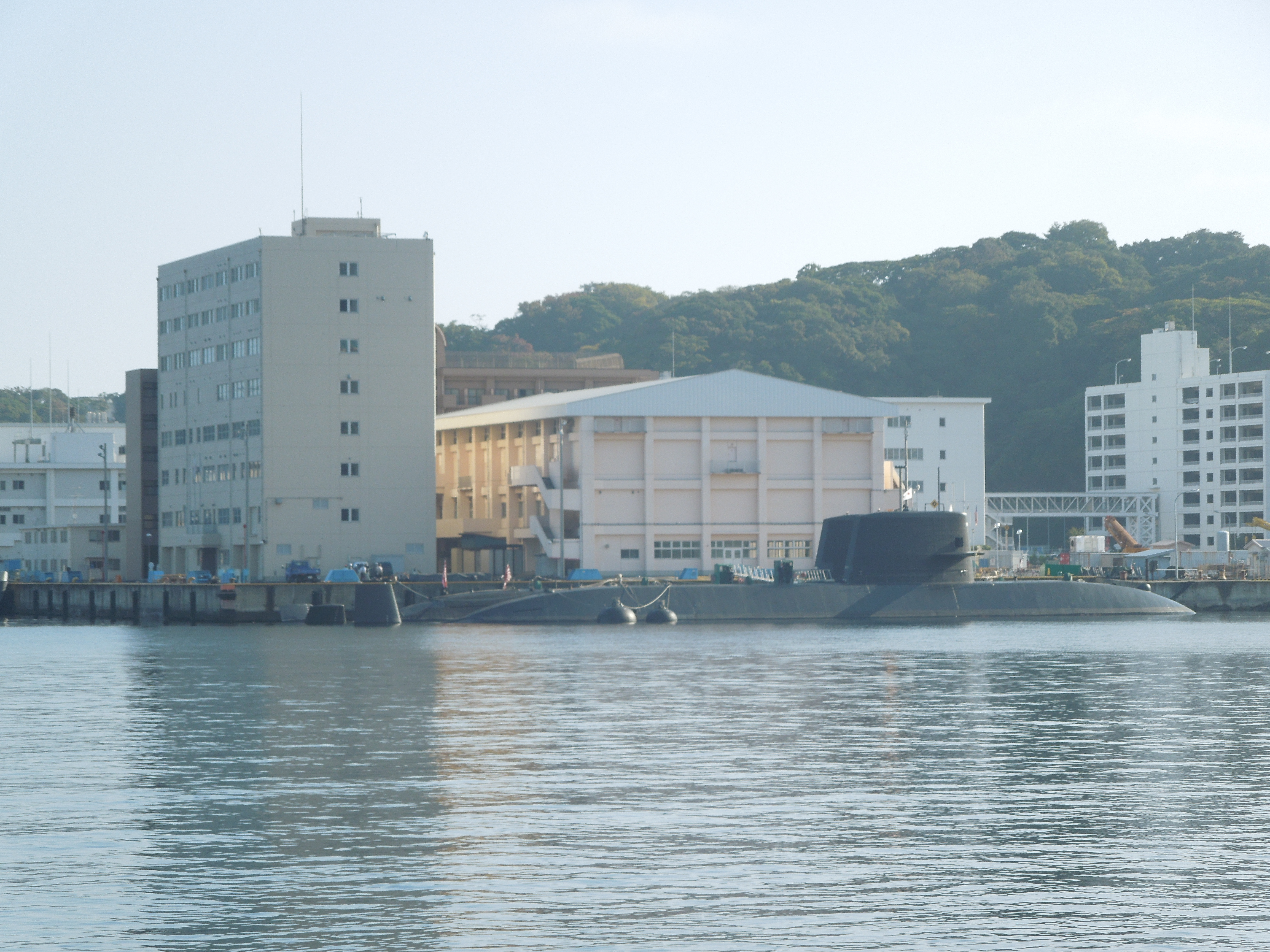 横須賀潜水艦基地